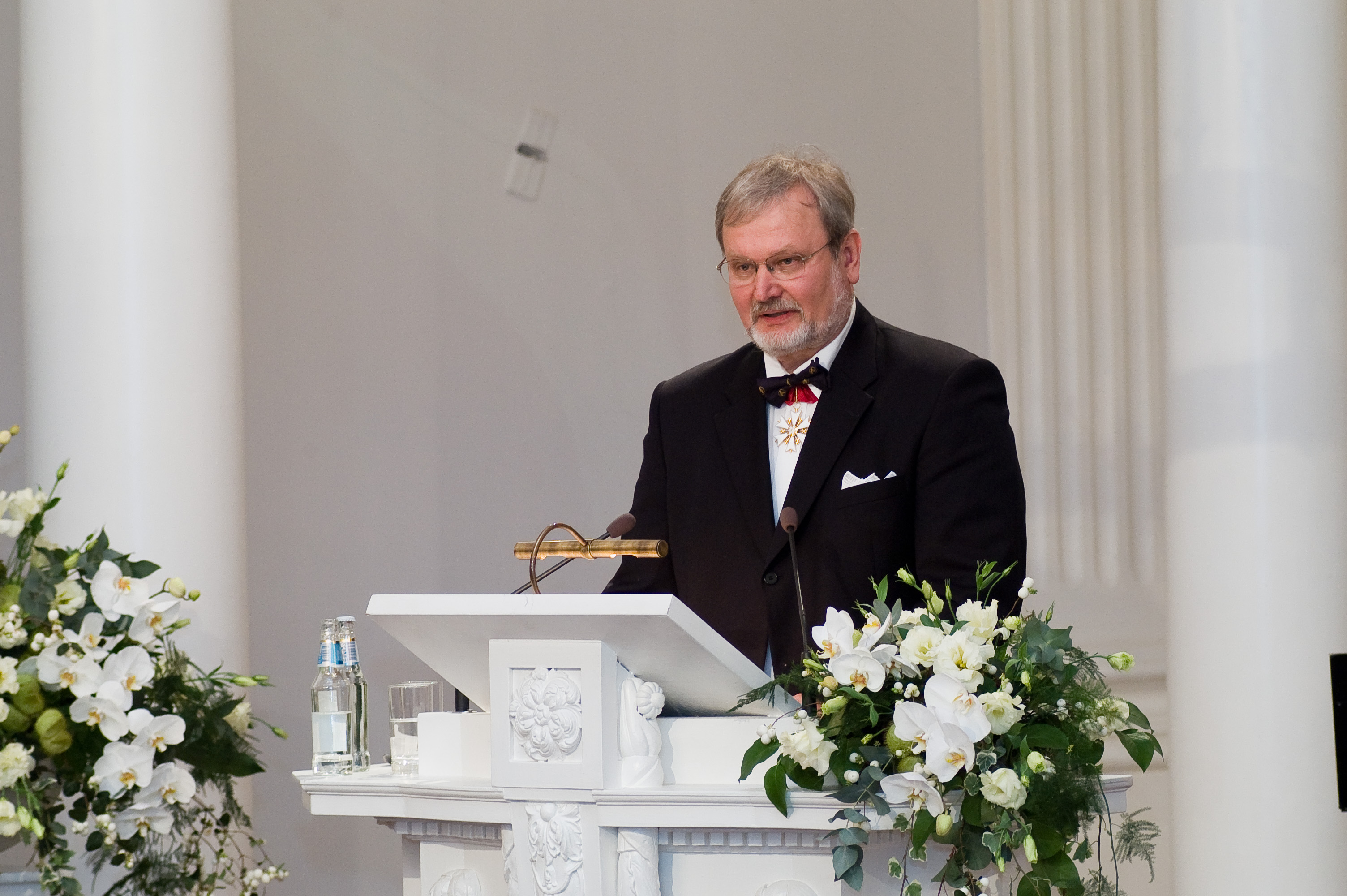 Tartu Ülikooli 375. aastapäeva aktus ülikooli aulas 5. oktoobril 2007. Aastapäeva loenguga “Universitas Tartuensis 400“ esineb Tartu Ülikooli biomeditsiinitehnoloogia professor, akadeemik Mart Ustav.